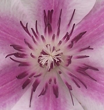 Etamines et stigmates de la clématite 'Carnaby'